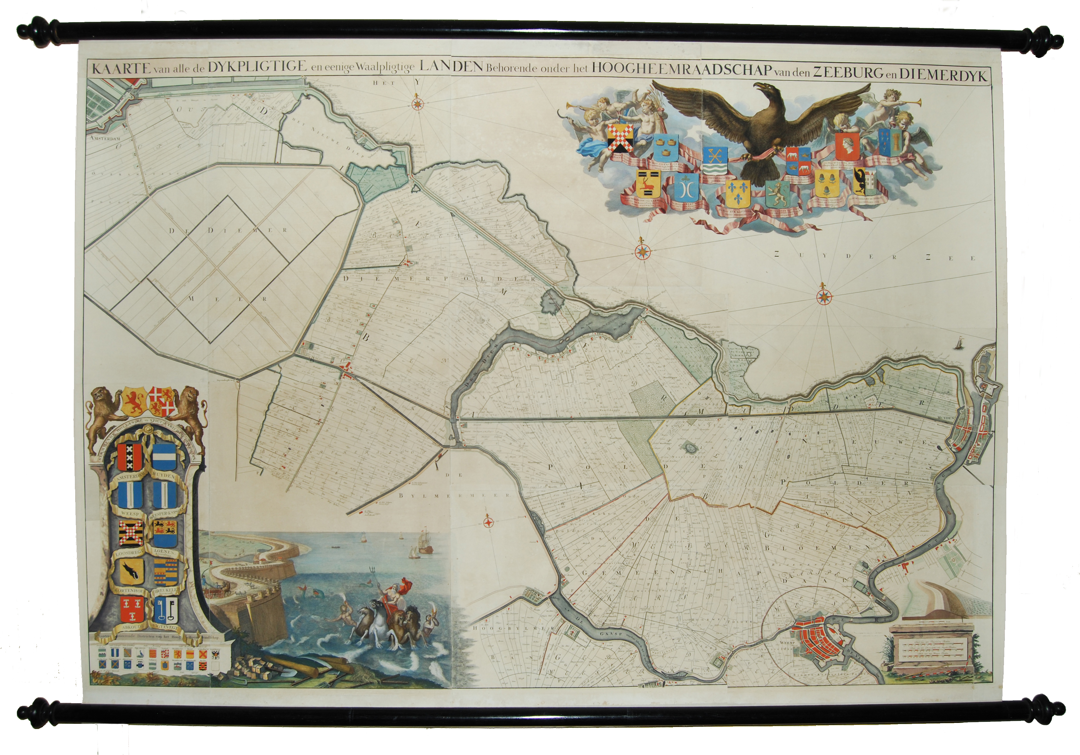 Kaarte van alle de Dijkpligtige en eenige Waalpligtige Landen behoorende onder het Hoogheemraadschap van den Zeeburg en Diemerdijk. Kopergravure vervaardigd door Jan Wandelaar. 10 bladen, gemonteerd op linnen, tussen de originele houten ophangstokken. Uitgegeven tussen 1734-1754. Afm. (kaart) ca. 130 x 182 cm.